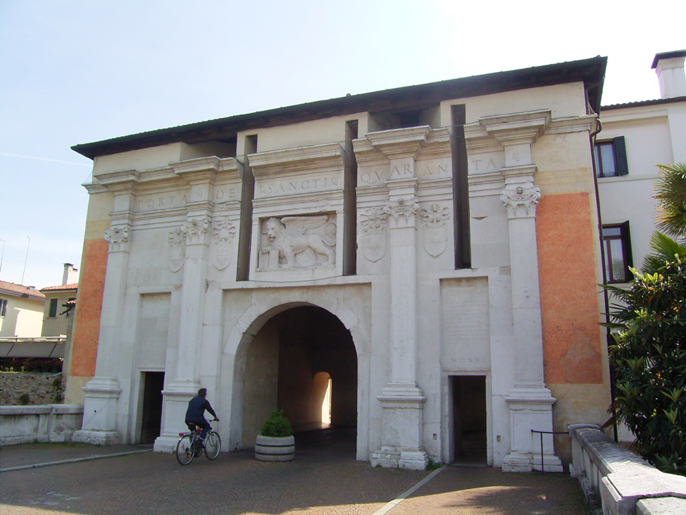 Porta Santi Quaranta, Treviso, Italia.